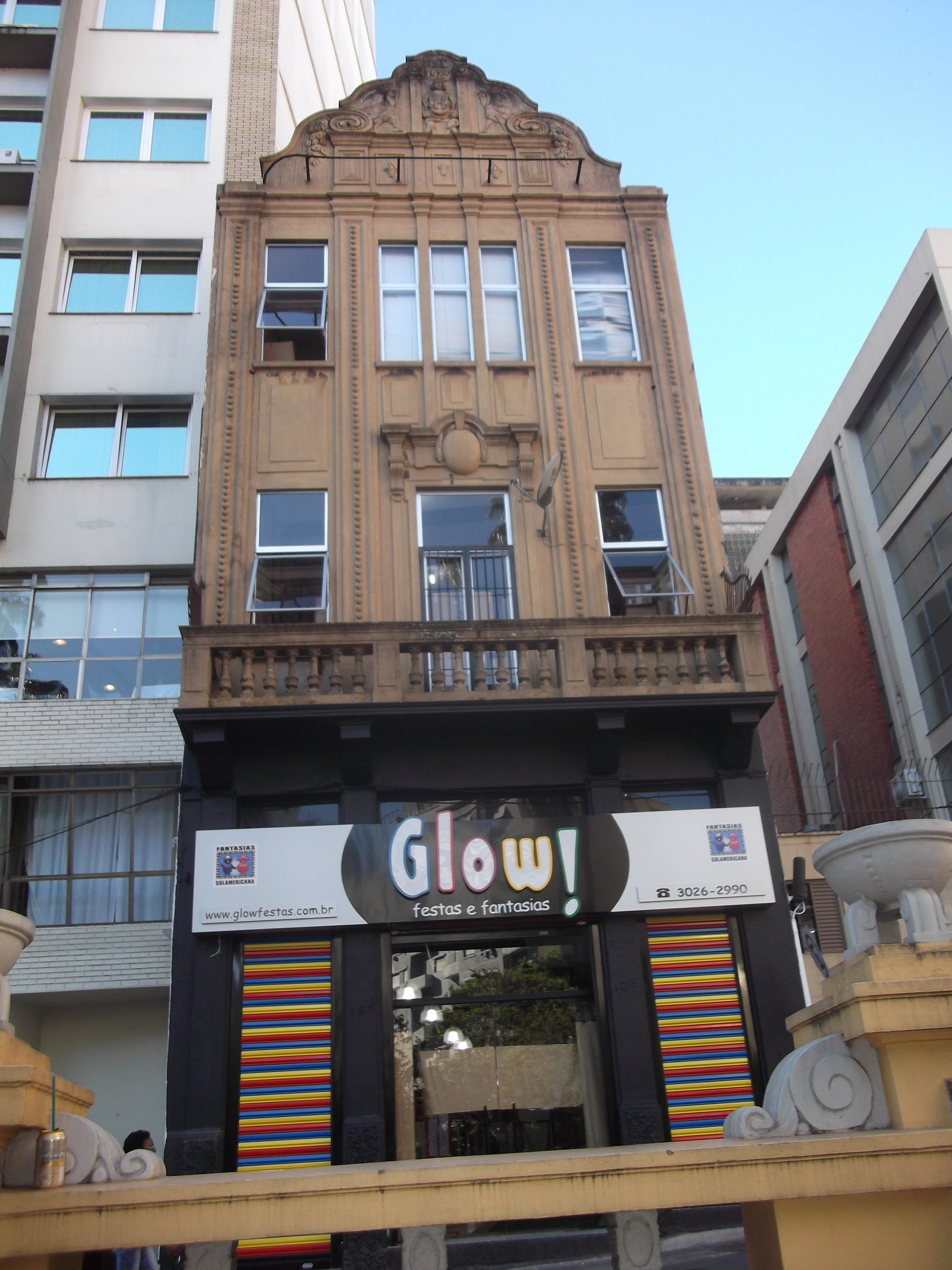 Rua Senhor dos Passos, 166, Porto Alegre, Brasil